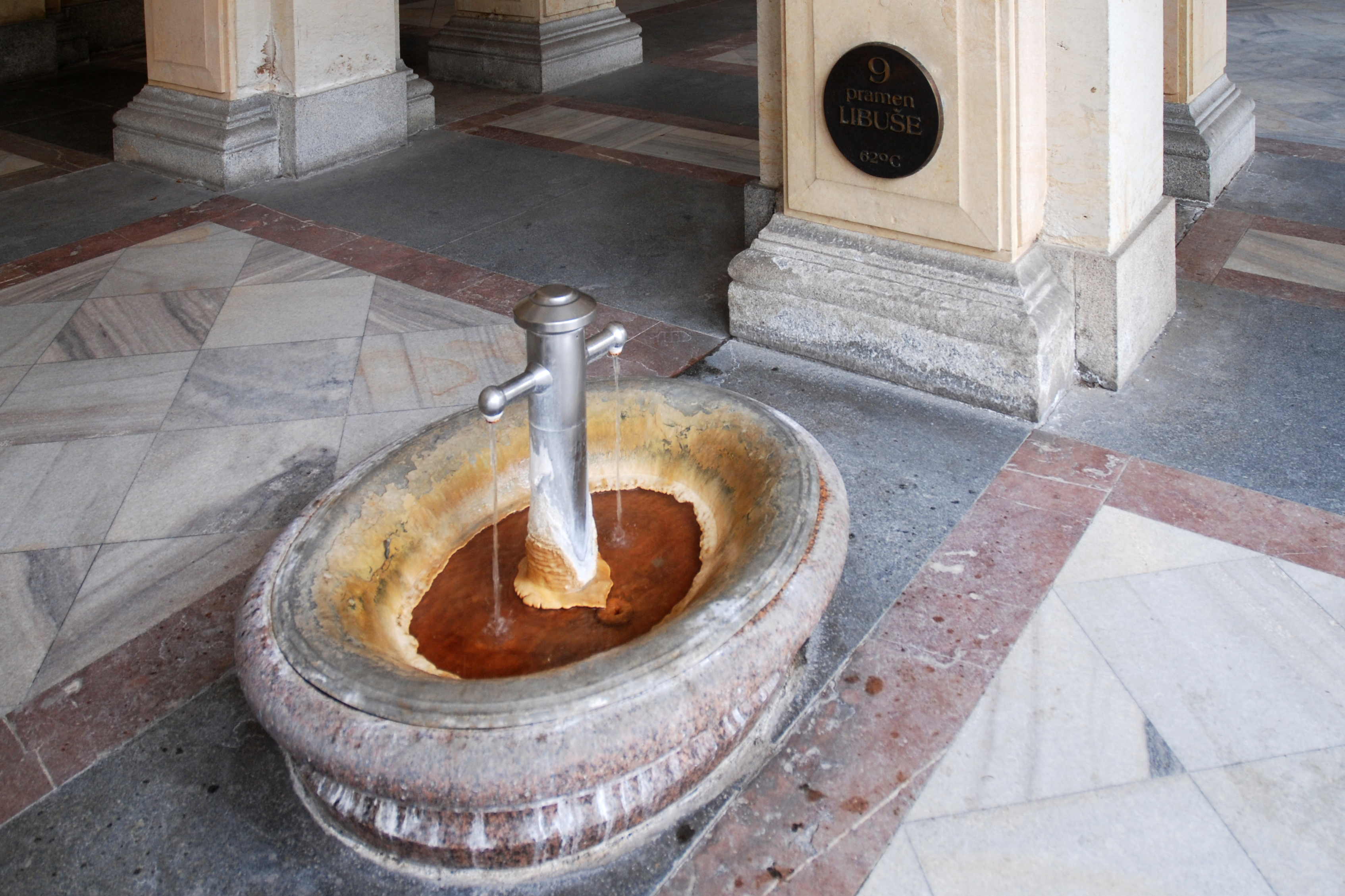 Karlovy Vary, pramen č. 9 Libuše v Mlýnské kolonádě